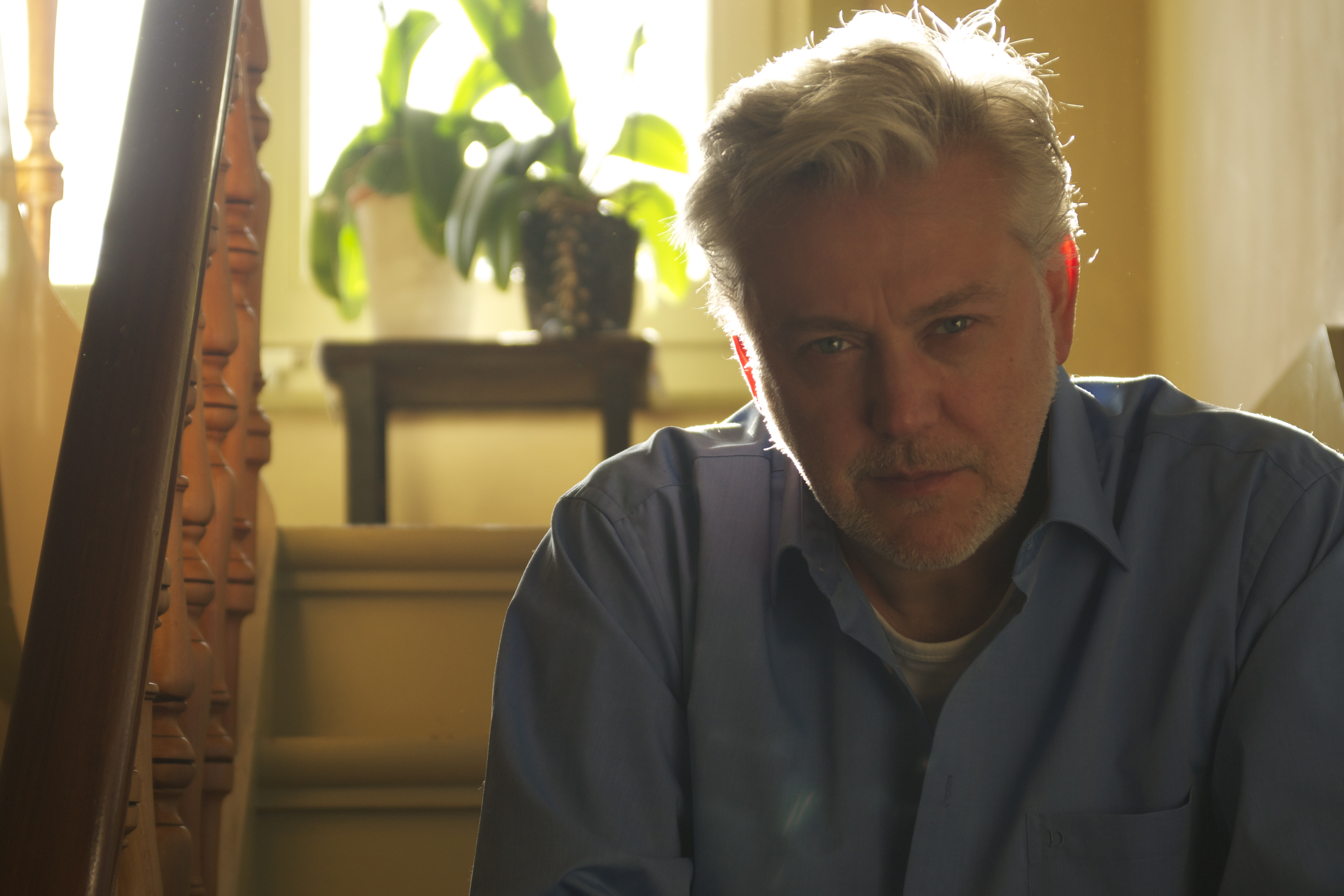 Wim Henderickx